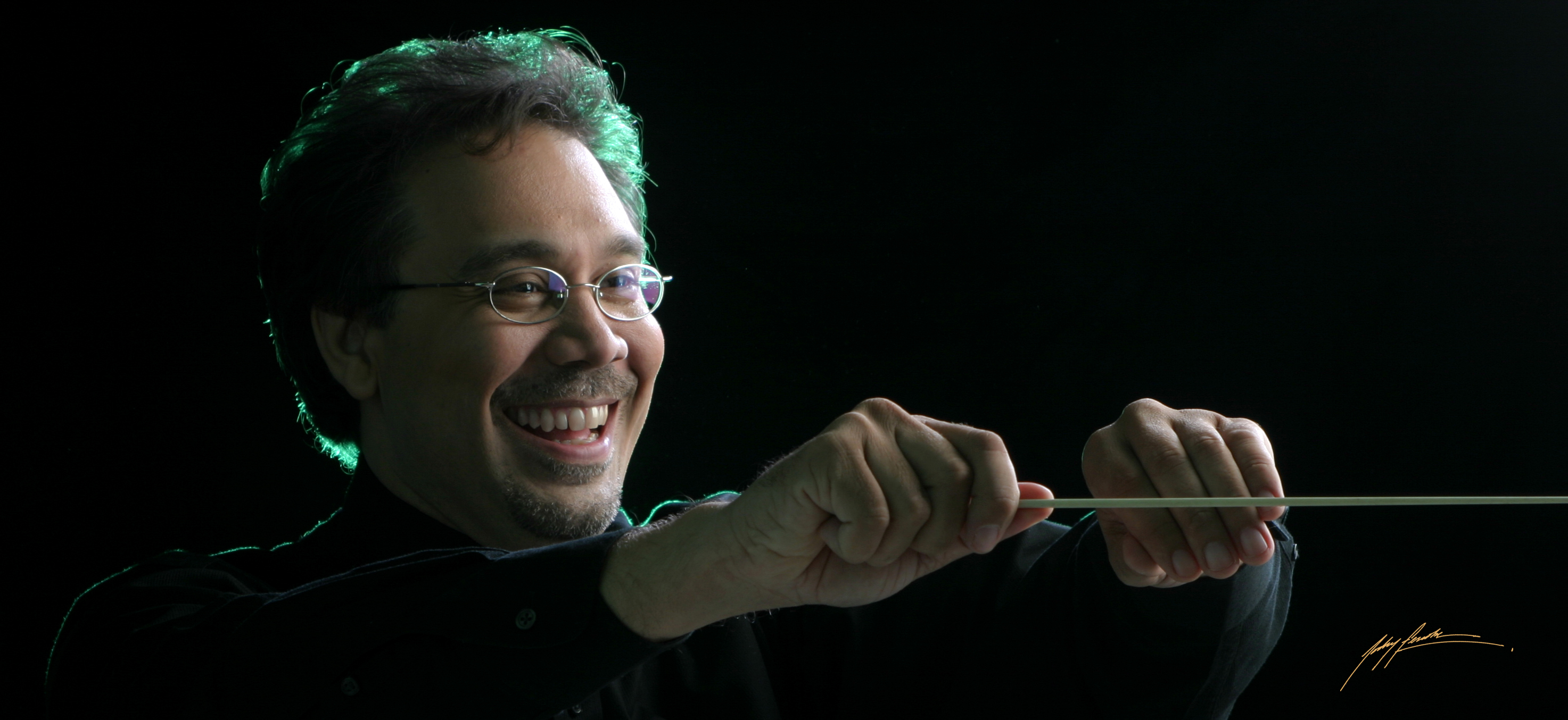 Maestro Caonex-Peguero Camilo